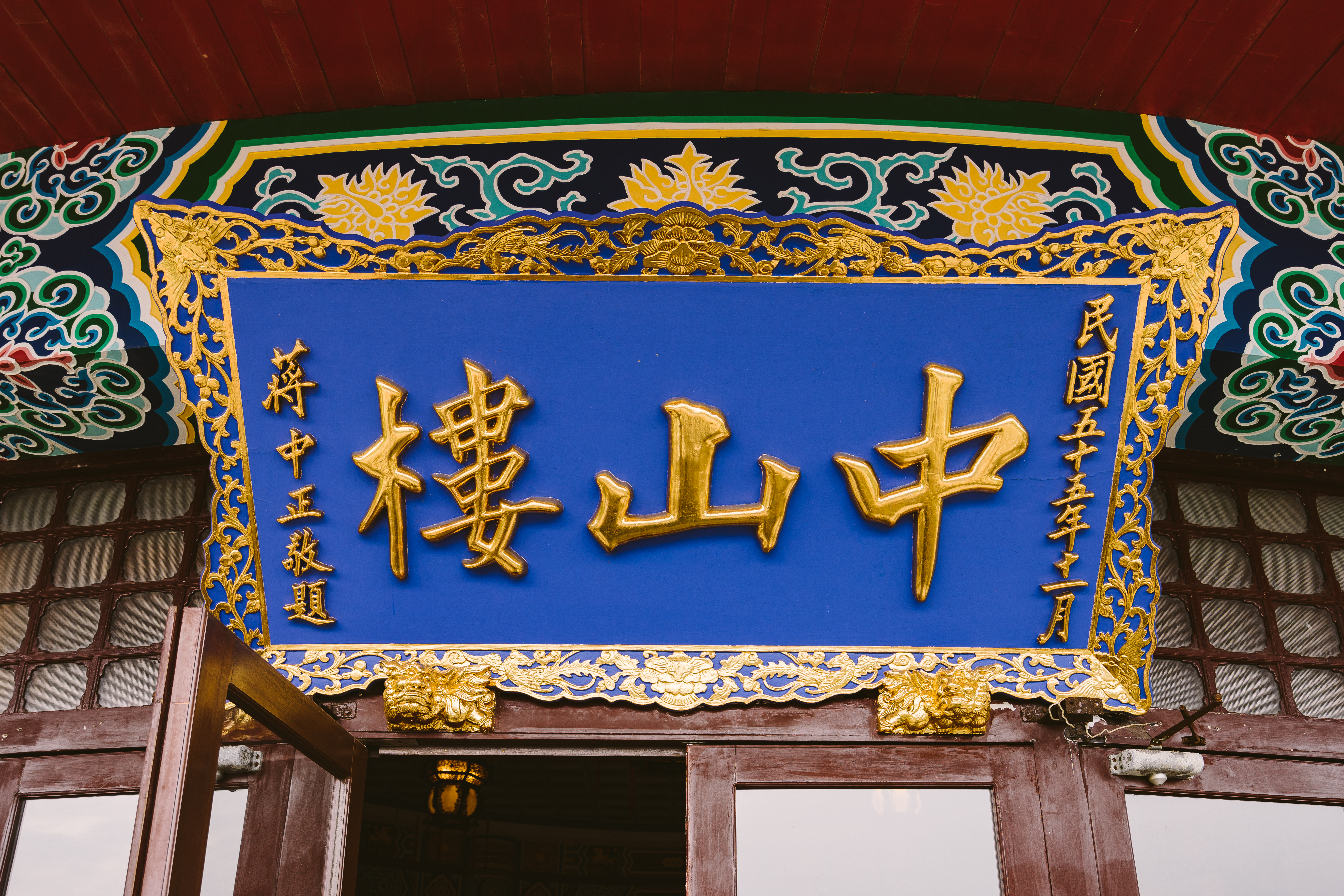 中文（台灣）: 陽明山中山樓外牆懸掛的1966年（中華民國55年）11月蔣中正題字匾額。